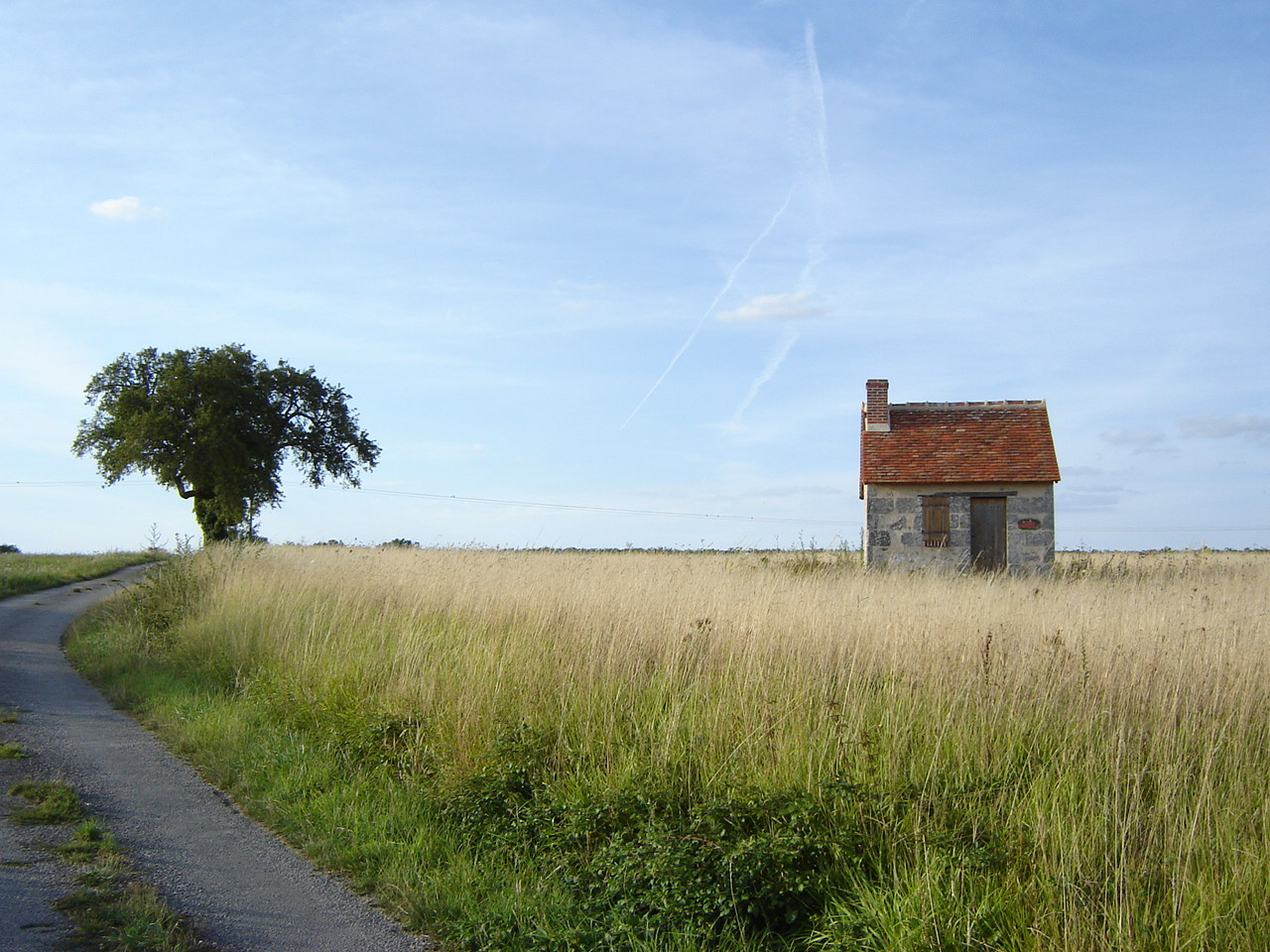 Loge de vigne restaurée. Elle se situe en haut des Availlons.